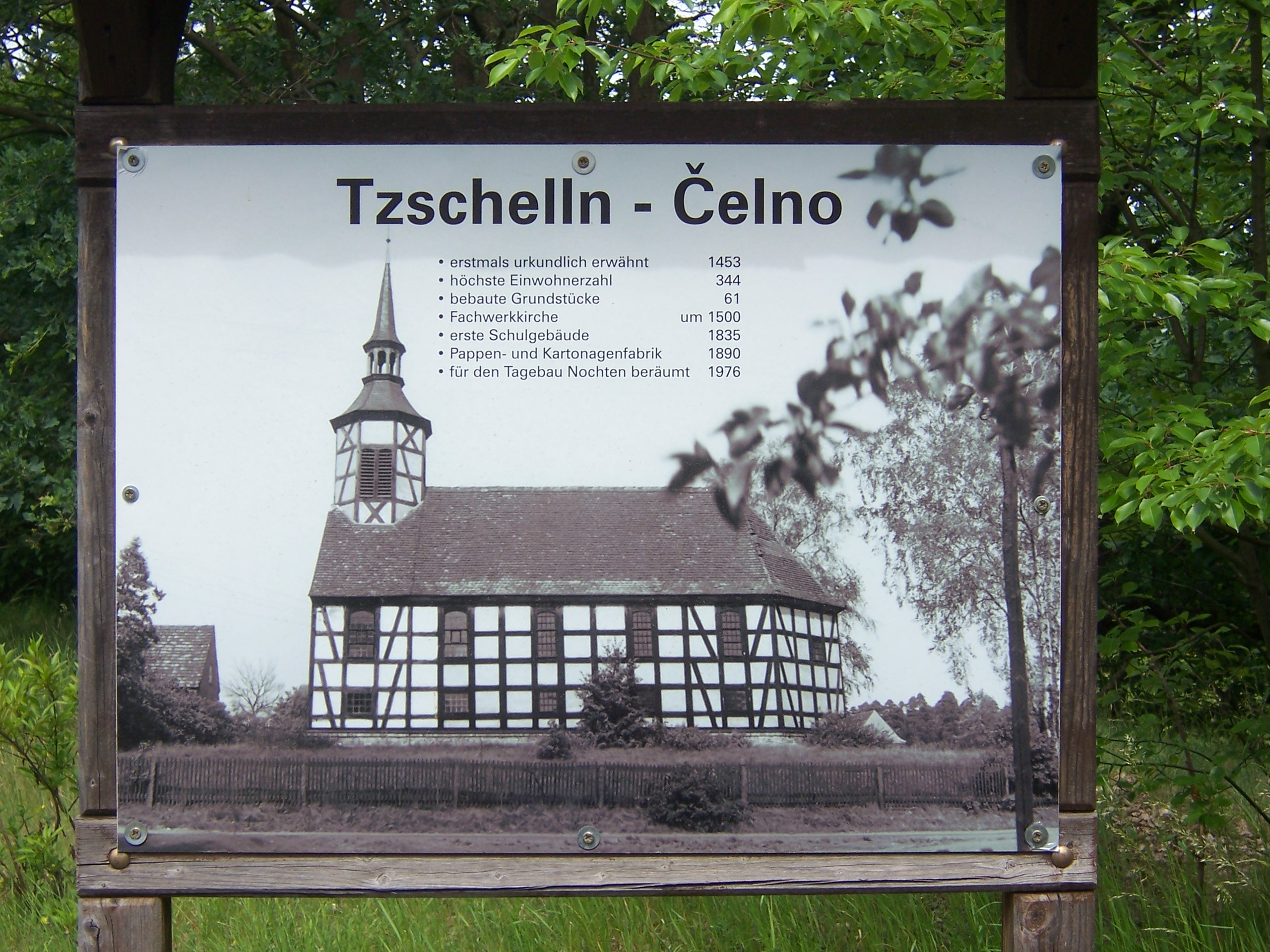 Gedenktafel für Tzschelln